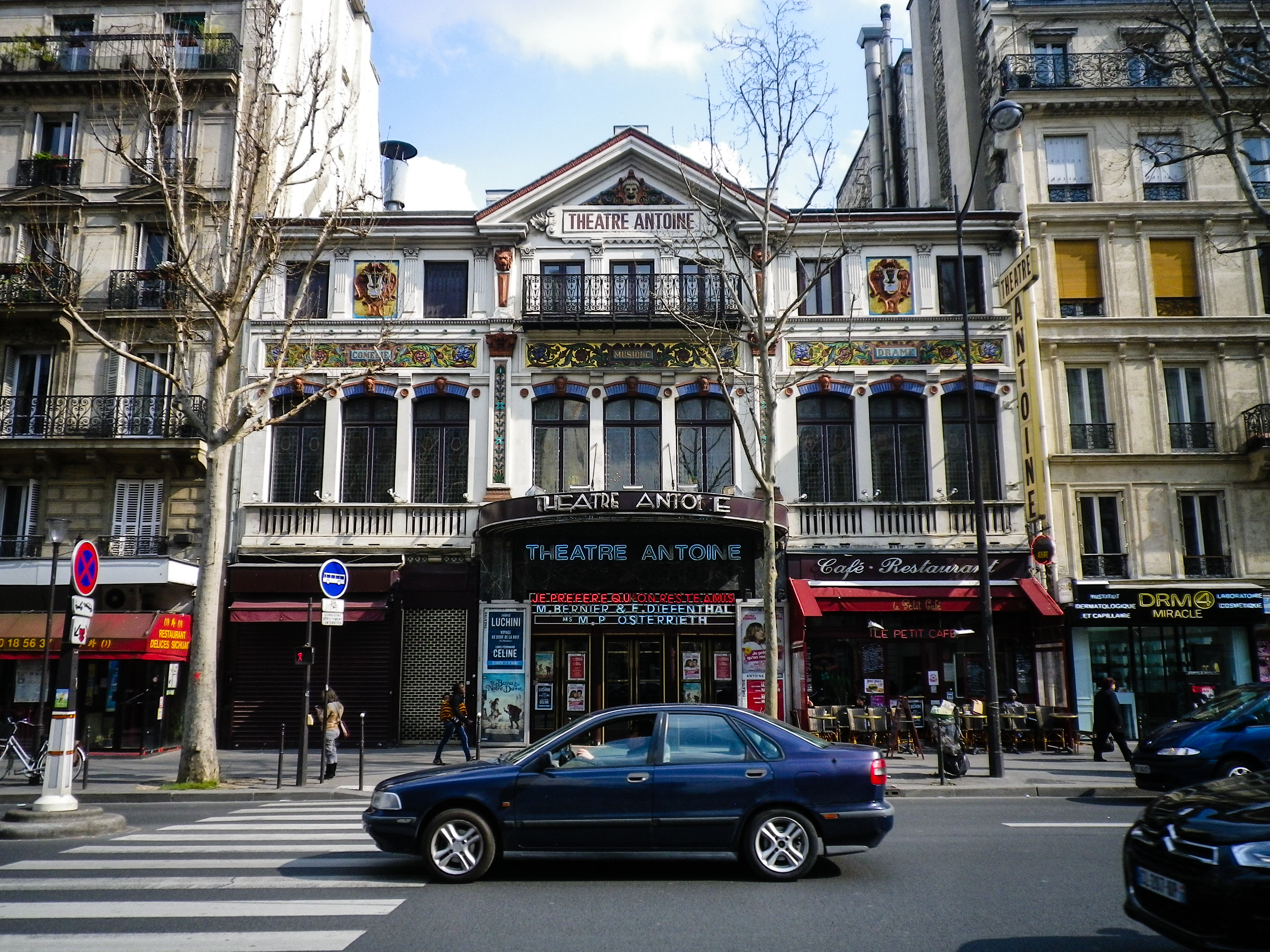 Théâtre Antoine, Paris.